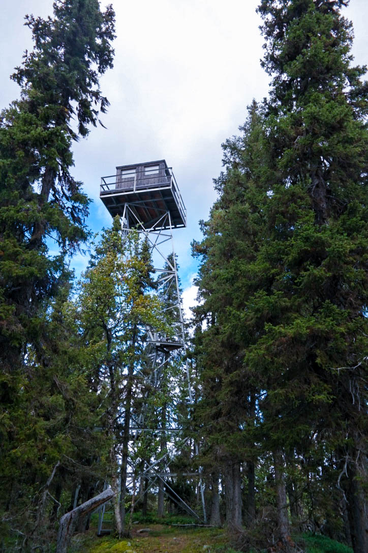 Tour d'observation près du lac de Muddus, dans le parc national